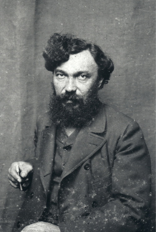 Ukrainian painter Ivan Pokhitonov (1850-1923)